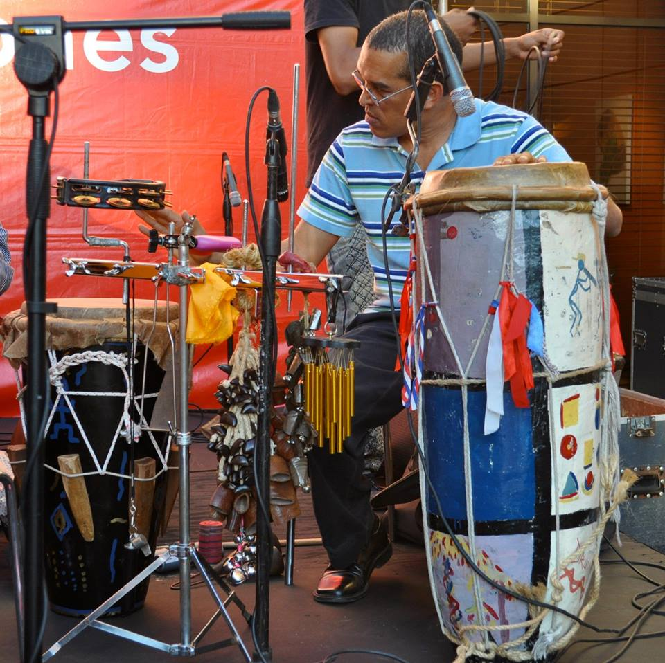 Edis Sánchez tocando